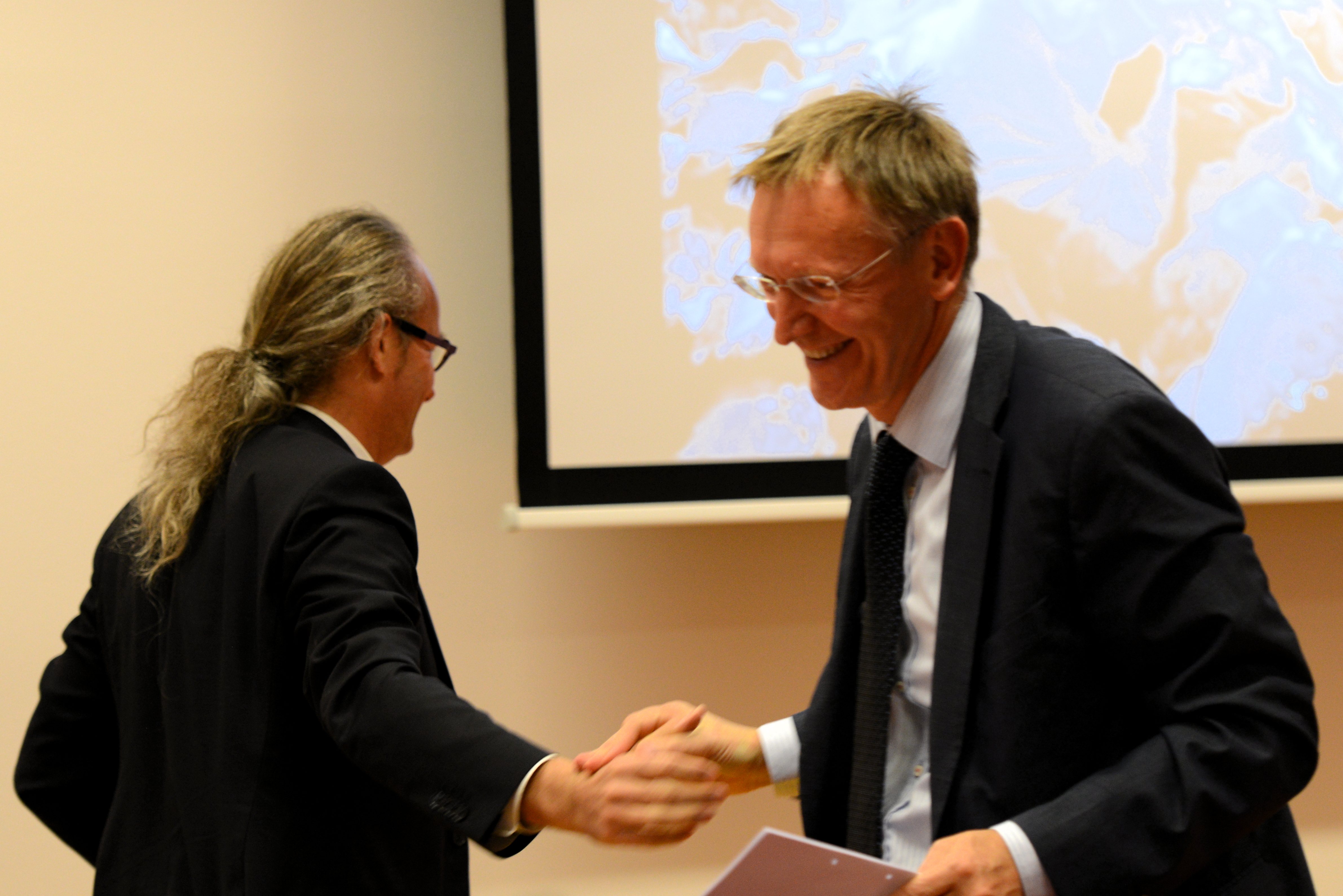 De Claude Turmes iwwergëtt d'Ried un den Janez Potočnik, Ëmwelt-Kommissär vun der Europäescher Kommissioun, bei der Conférence-débat: «Économie circulaire et nouvelles formes de consommation. Stratégies européennes et perspectives luxembourgeoises», den 20. Oktober 2014 am CRP Henri-Tudor um Kierchbierg.